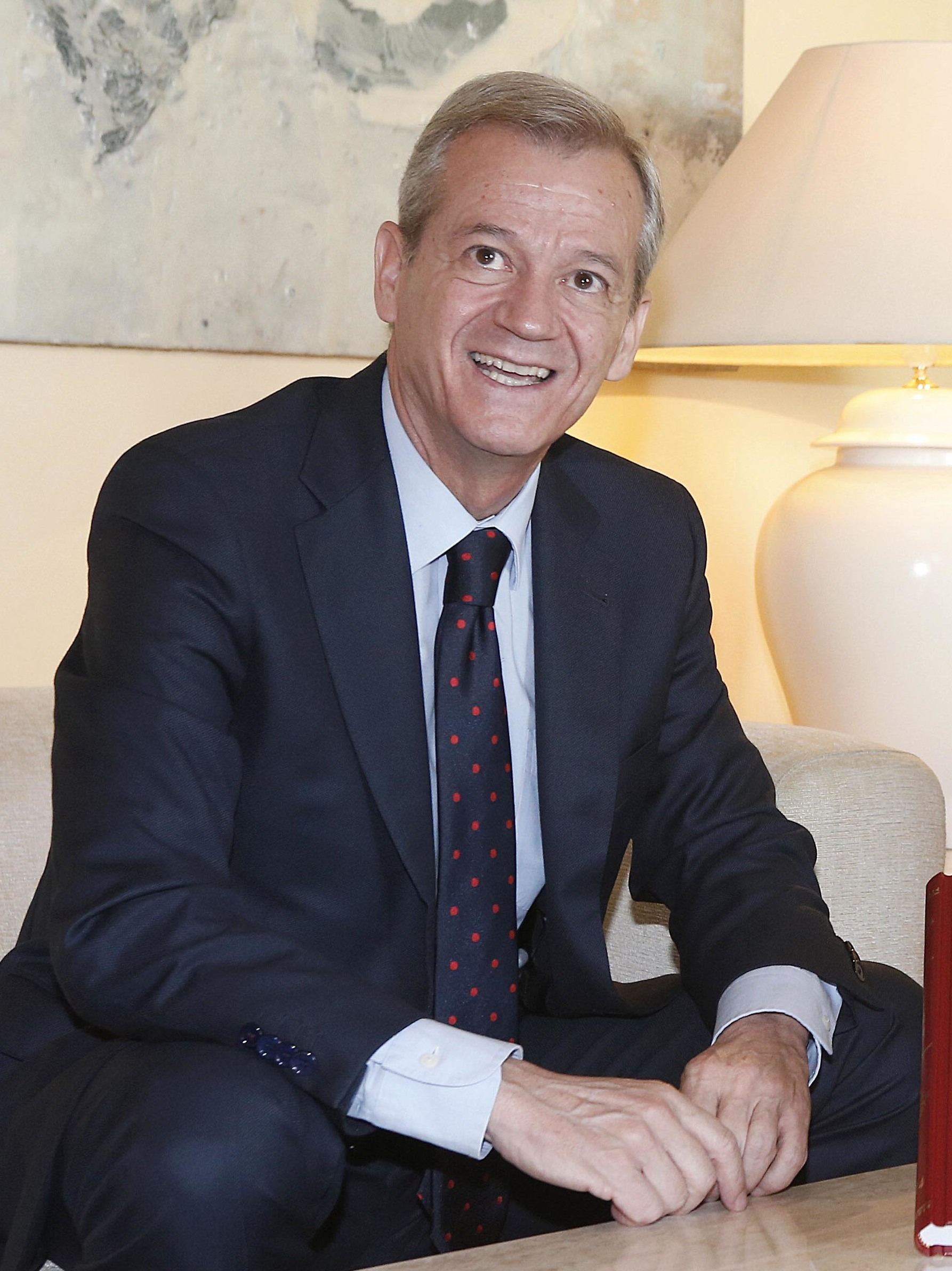 En la memoria que hoy me ha entregado el Fiscal del Tribunal Superior de Justicia podemos ver que los delitos siguen bajando en la Comunidad de Madrid. El descenso de la criminalidad es beneficioso para todos y por eso vamos a seguir trabajando conjuntamente con todos los agentes jurídicos y así contribuir a mejorar la justicia gratuita y las infraestructuras de este sector.